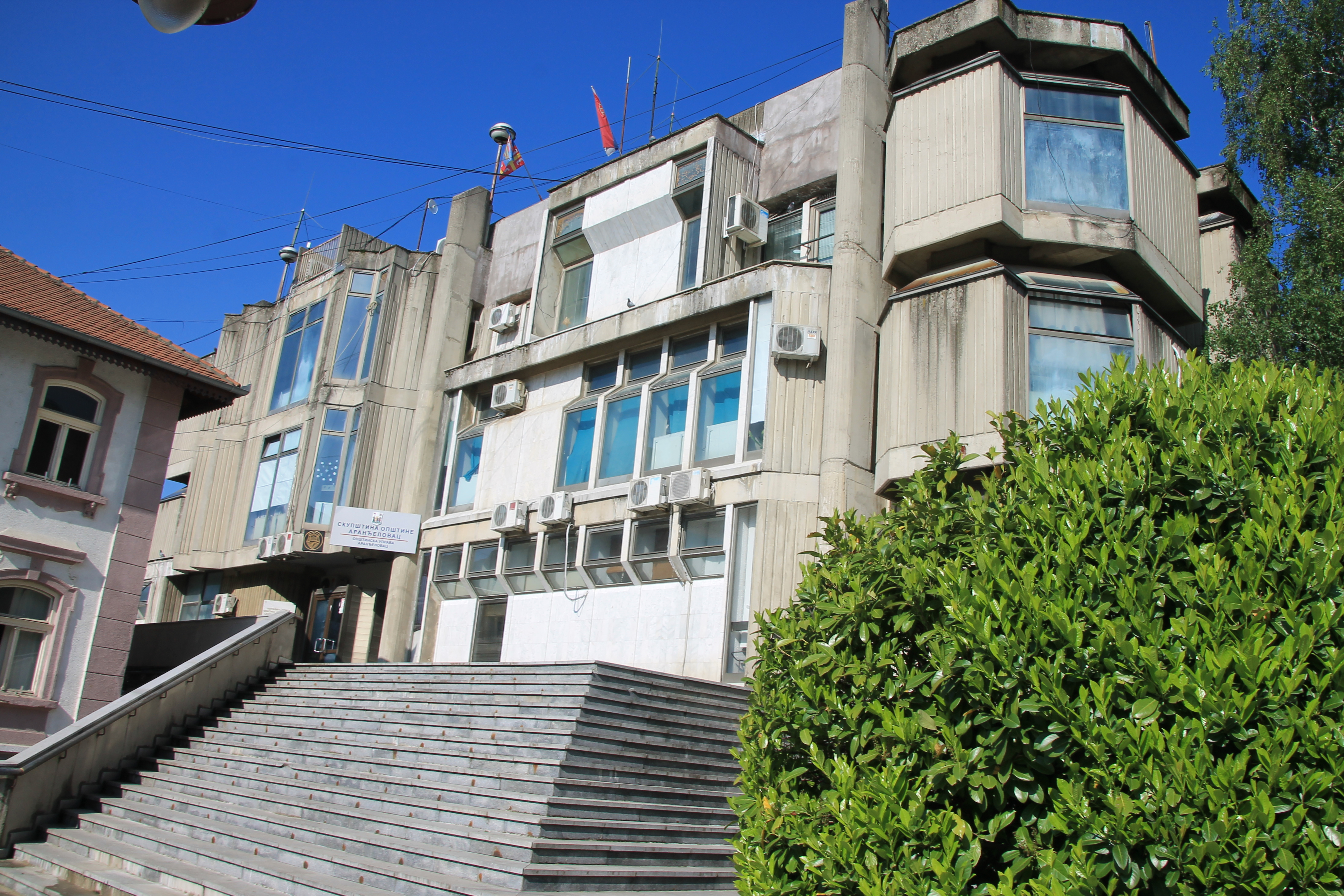 Zgrada SO Aranđelovac